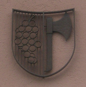 Das ehemalige Wappen von Harsberg am Feuerwehrmagazin in Pfedelbach-Oberhöfen